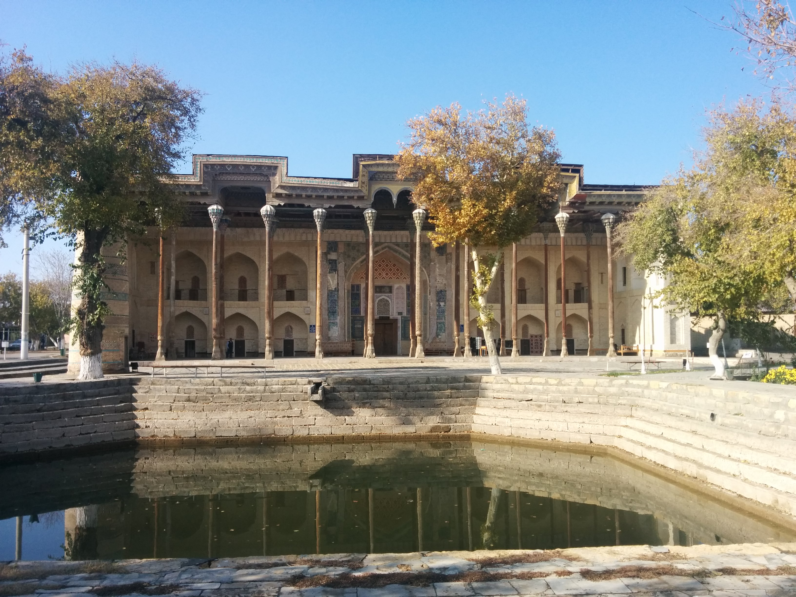 Buxorodagi me'moriy yodgorlik